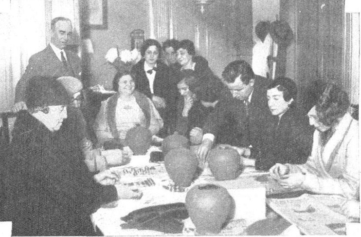 Acto de iniciación de la apertura de las alcancías de la colecta para el hogar para ciegos "Vicenta Castro Cambón". En la foto aparecen la presidenta de la institución, señorita Marchi, las consejeras que dirigieron la colecta, Ernestina Llavallol de Acosta y Florencia Lanús, y otros integrantes de las comisiones. Aparecida en Caras y Caretas, 23 de junio de 1934.